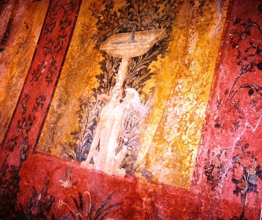 Détail d'une fresque de la villa de Poppée à Oplontis (Italie)